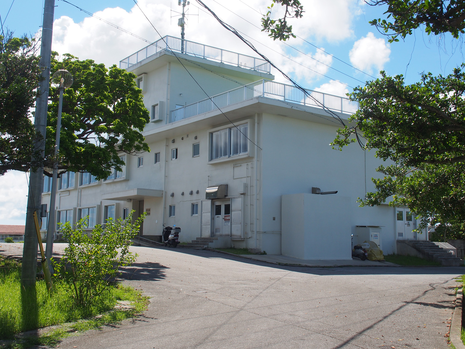 宮古地方気象台（沖縄県宮古島市）